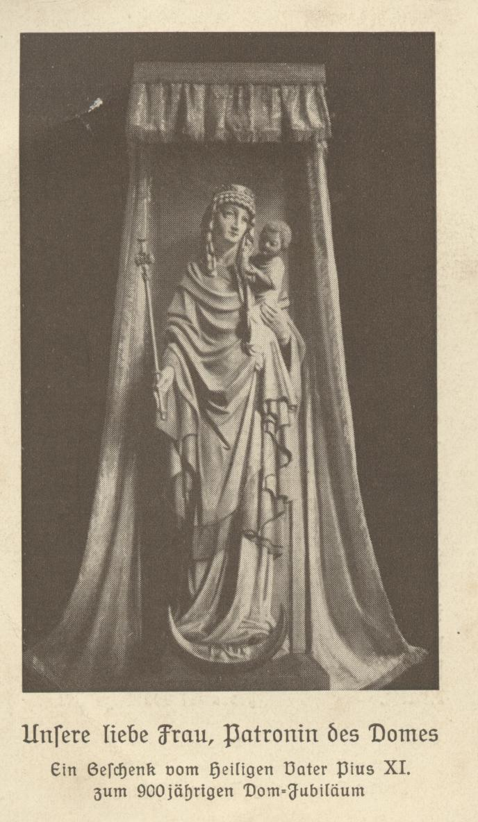 Speyerer Gnadenbild Patrona Spirensis von August Weckbecker